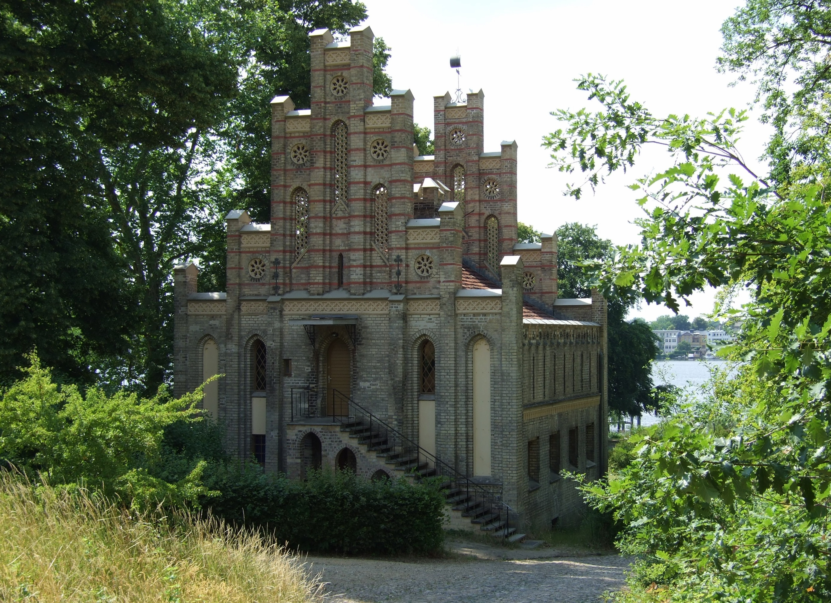 Matrosenhaus im Park Babelsberg, Potsdam